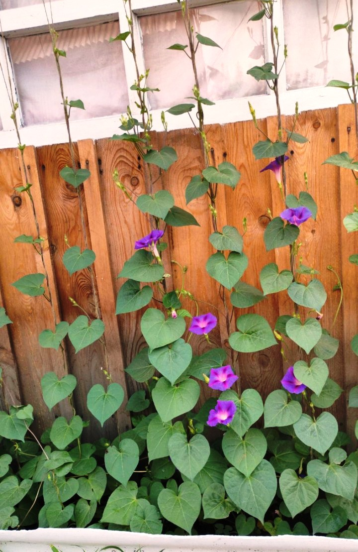 Ипомея. Восточная Сибирь